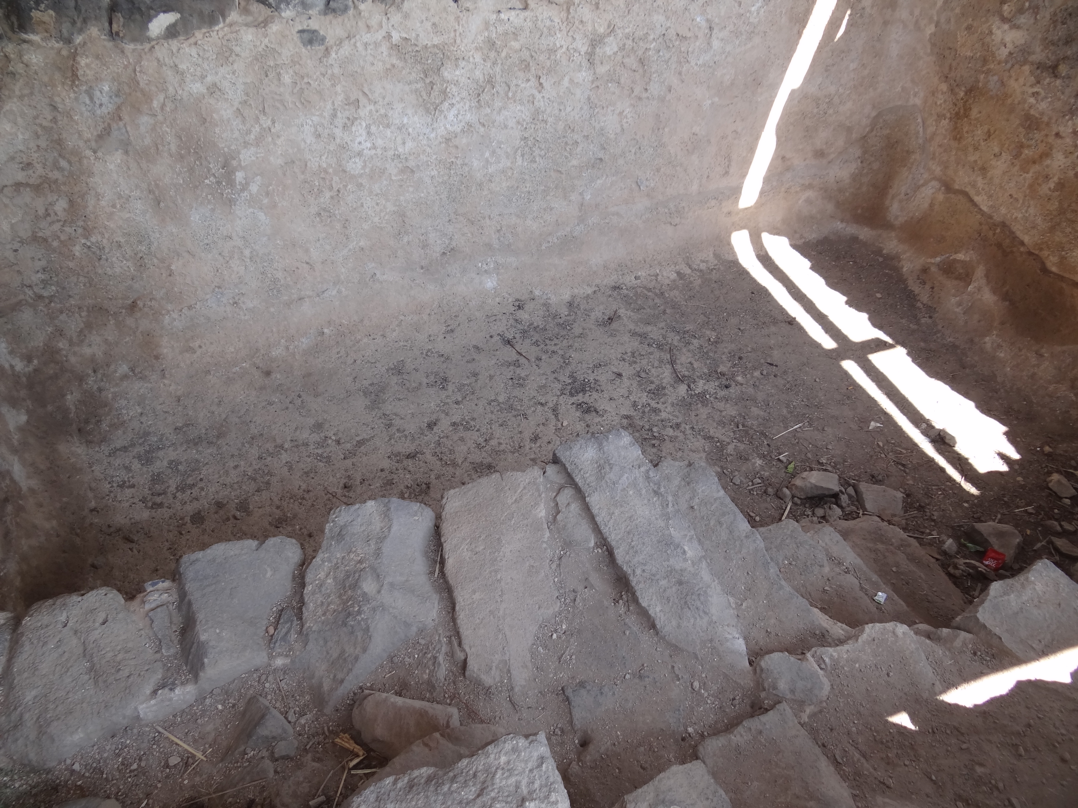 Gamla archaeology site אתר ארכאולוגי גמלא ברמת הגולן המקווה ליד בית הכנסת